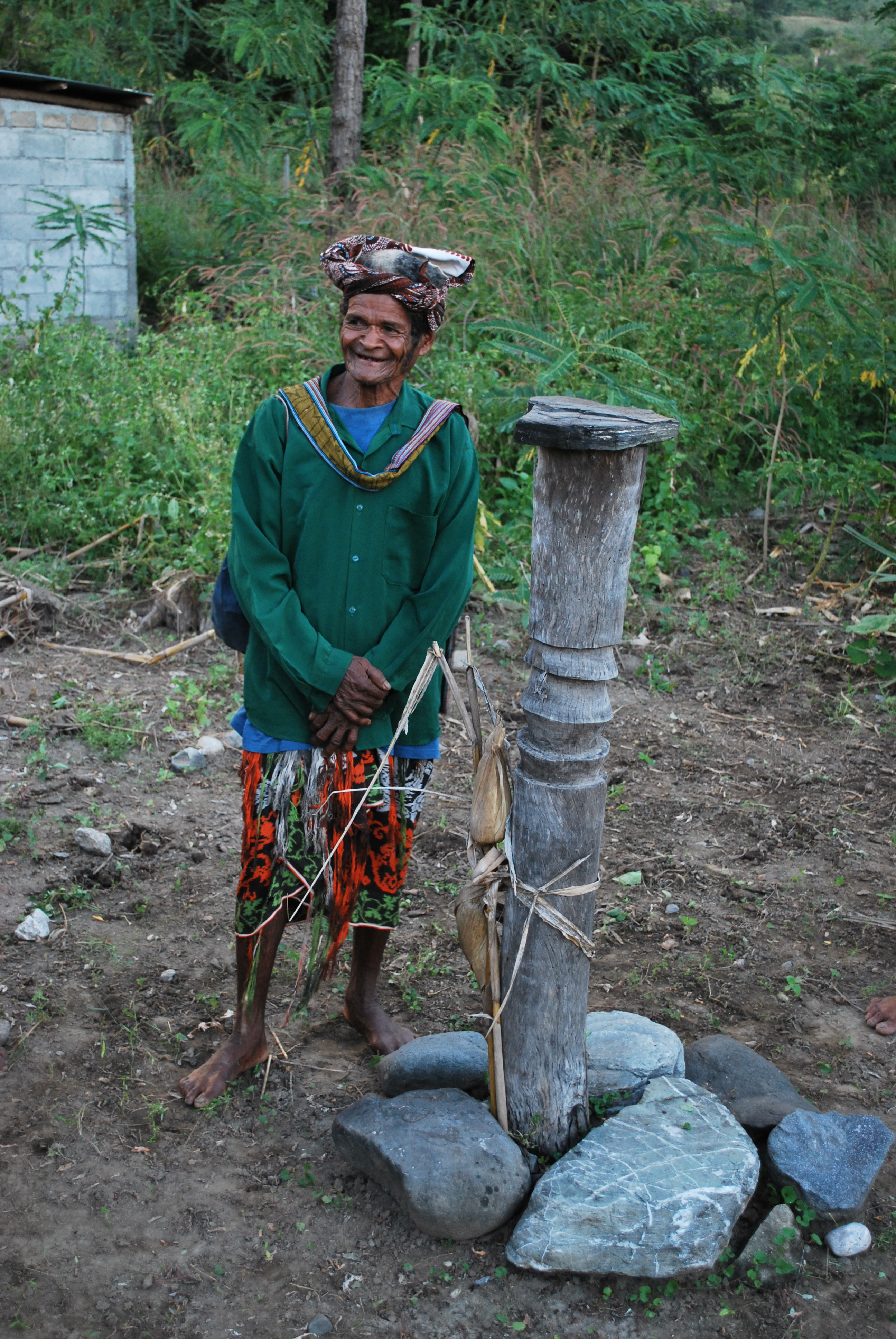 Heiliger Pfahl Ai To'os in Watu, Abani, Oecusse